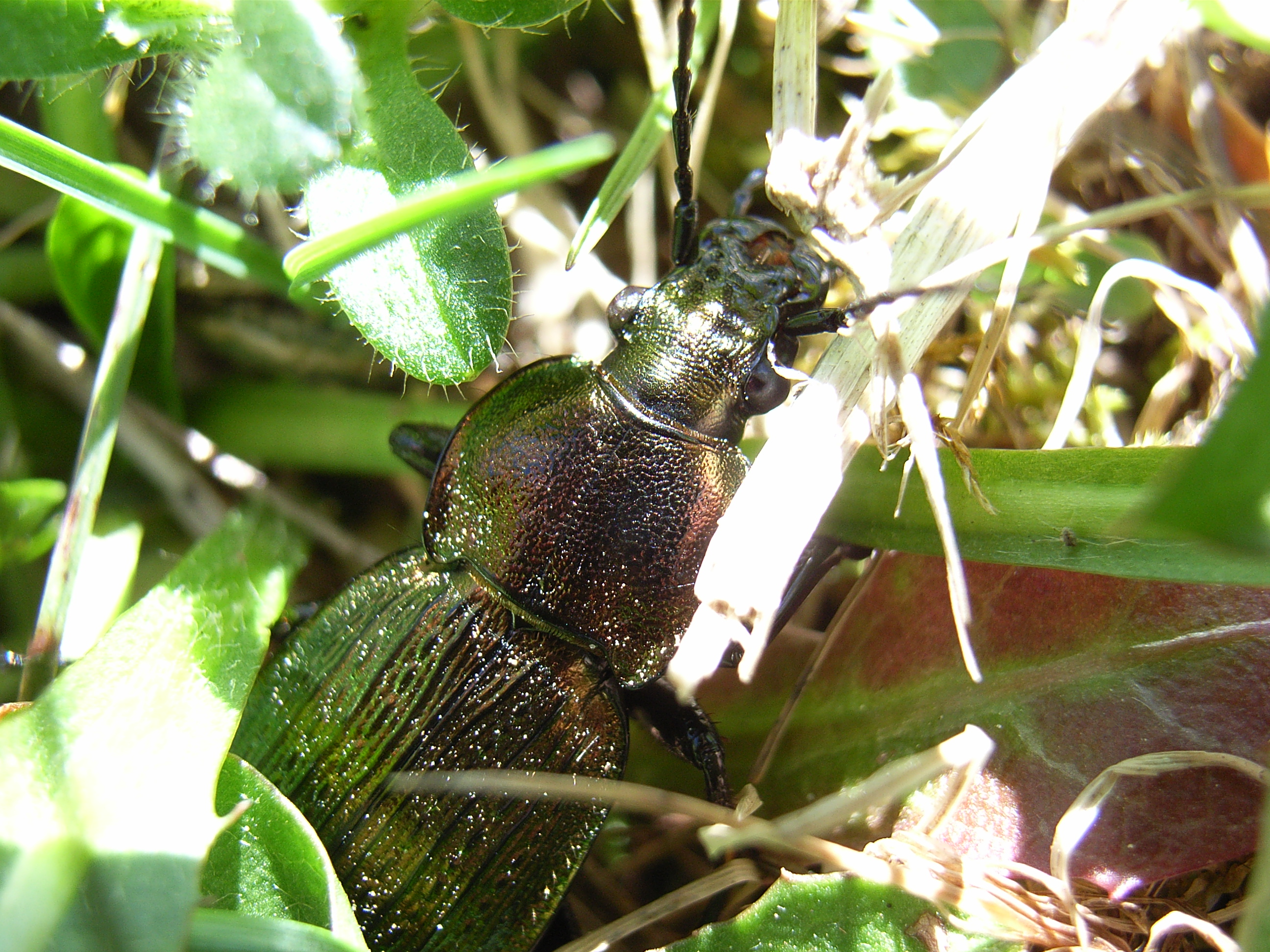 Carabus monilis under grass